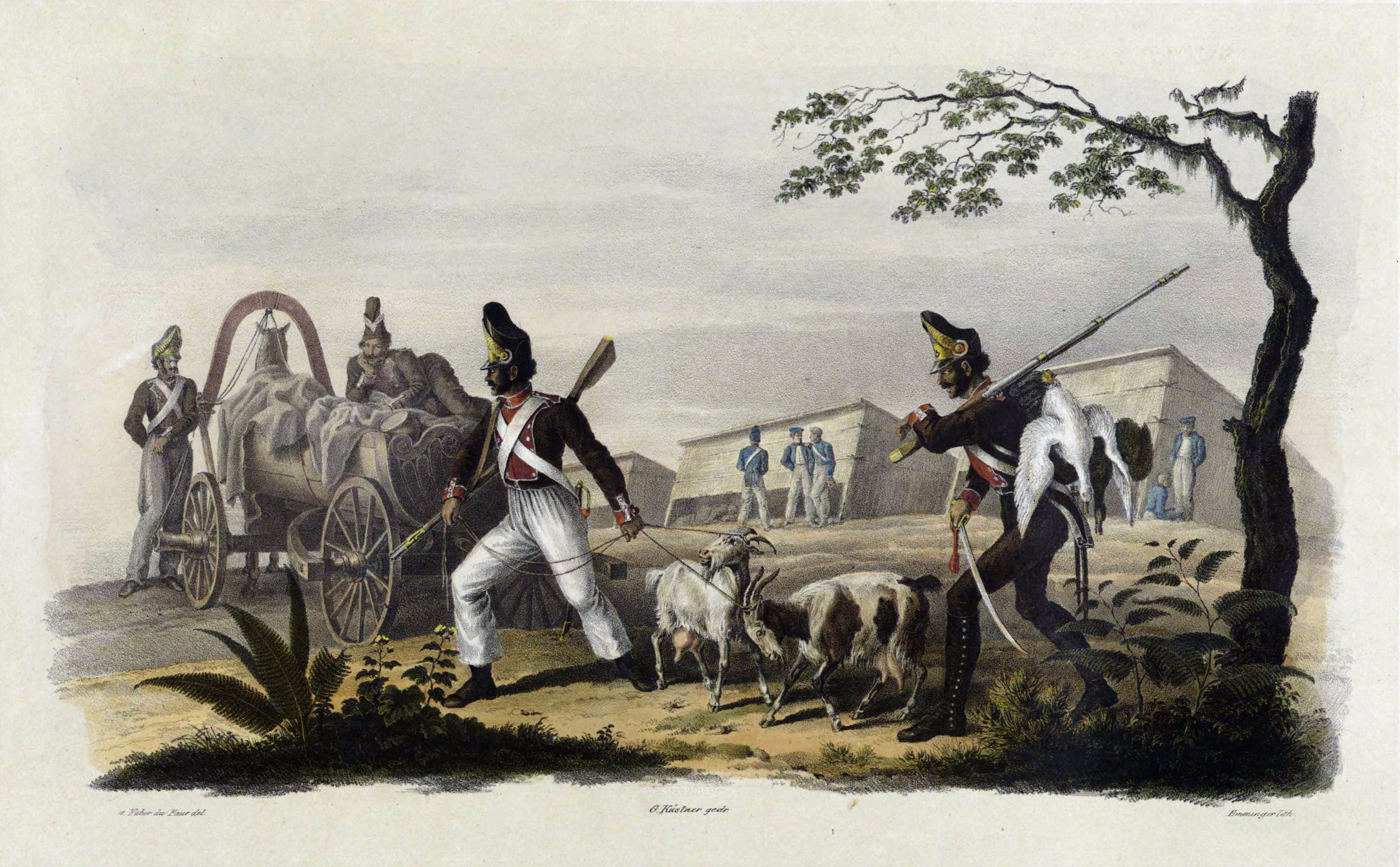 Беларуская (тарашкевіца): Бівак каля Лёзна (Lozna)